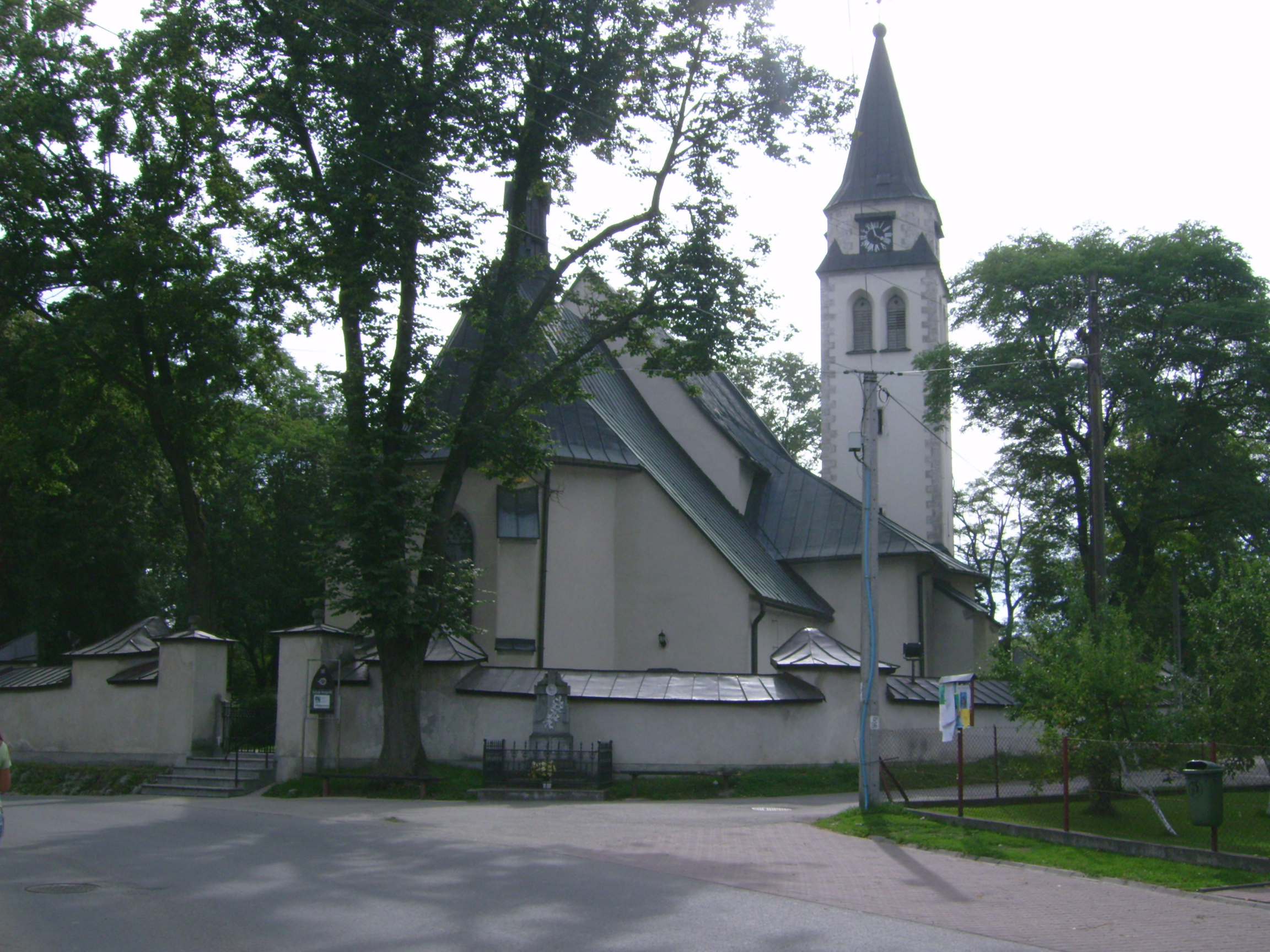 Kościół św. Bartłomieja (ok. 1320 r.) w Niedzicy